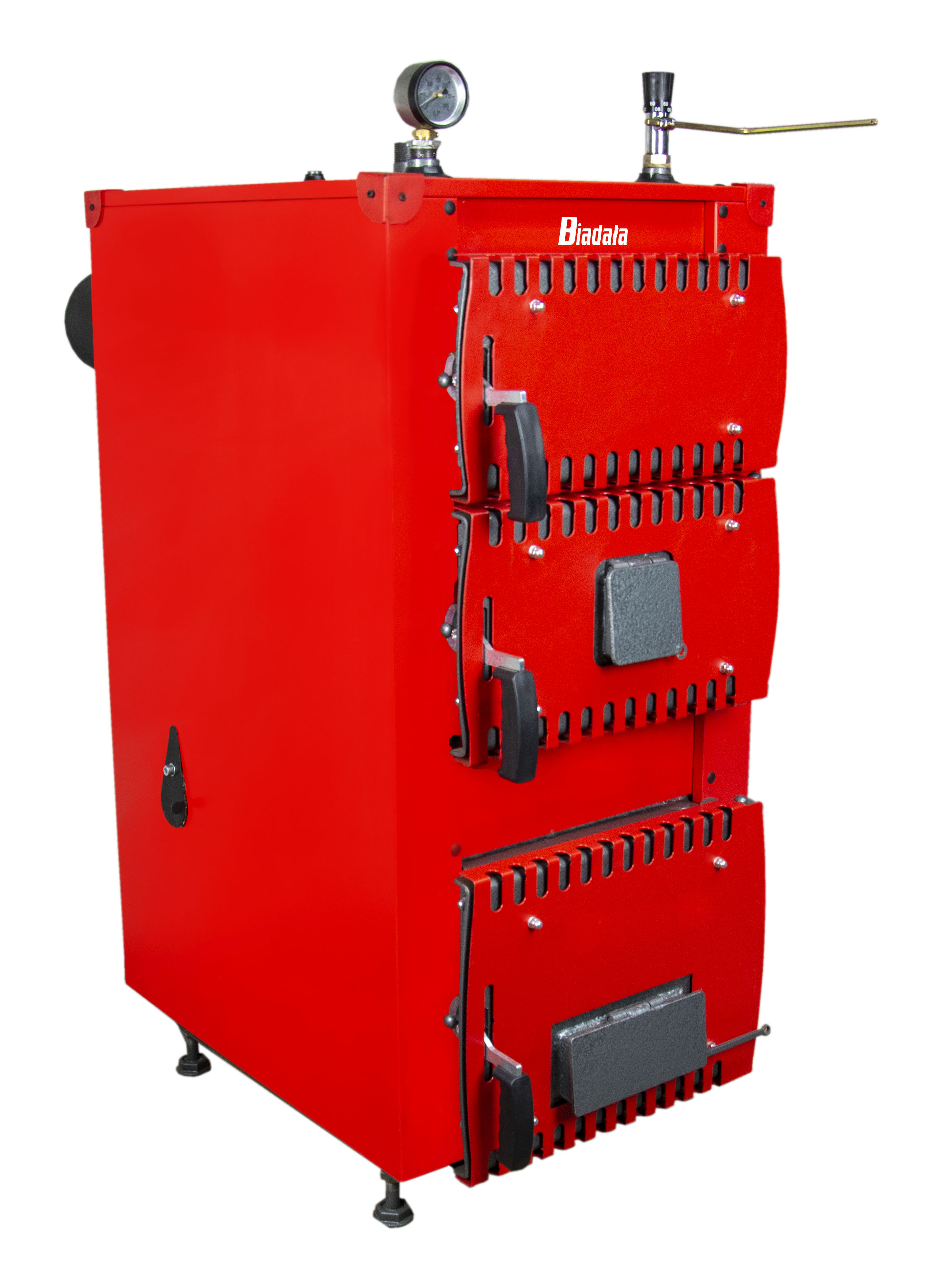 Kocioł Centralnego Ogrzewania zasypowy na węgiel 5 klasy